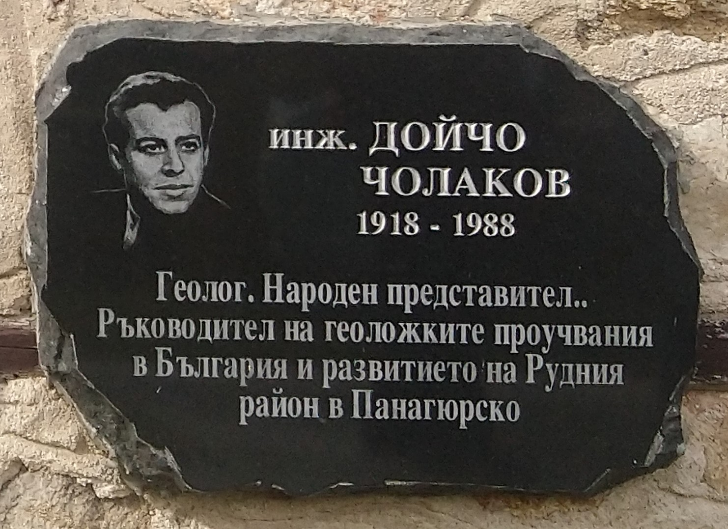 инж. Дойчо Чолаков (1918 - 1988) - плоча в Исторически музей Панагюрище - Надпис: Геолог. Народен представител. Ръководител на геоложките проучвания в България и развитието на Рудния район в Панагюрско.